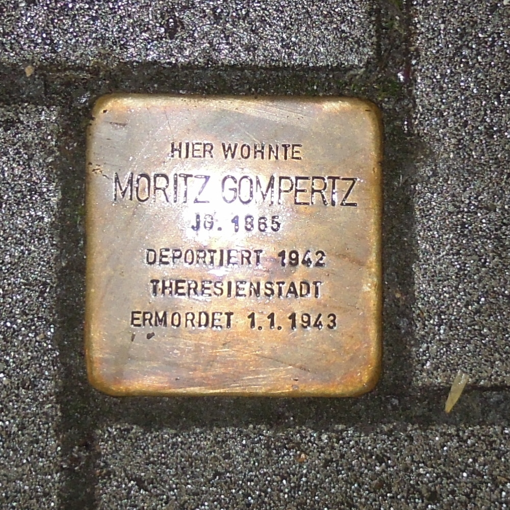 Stolperstein Geldern Issumer Straße 42 Moritz Gompertz